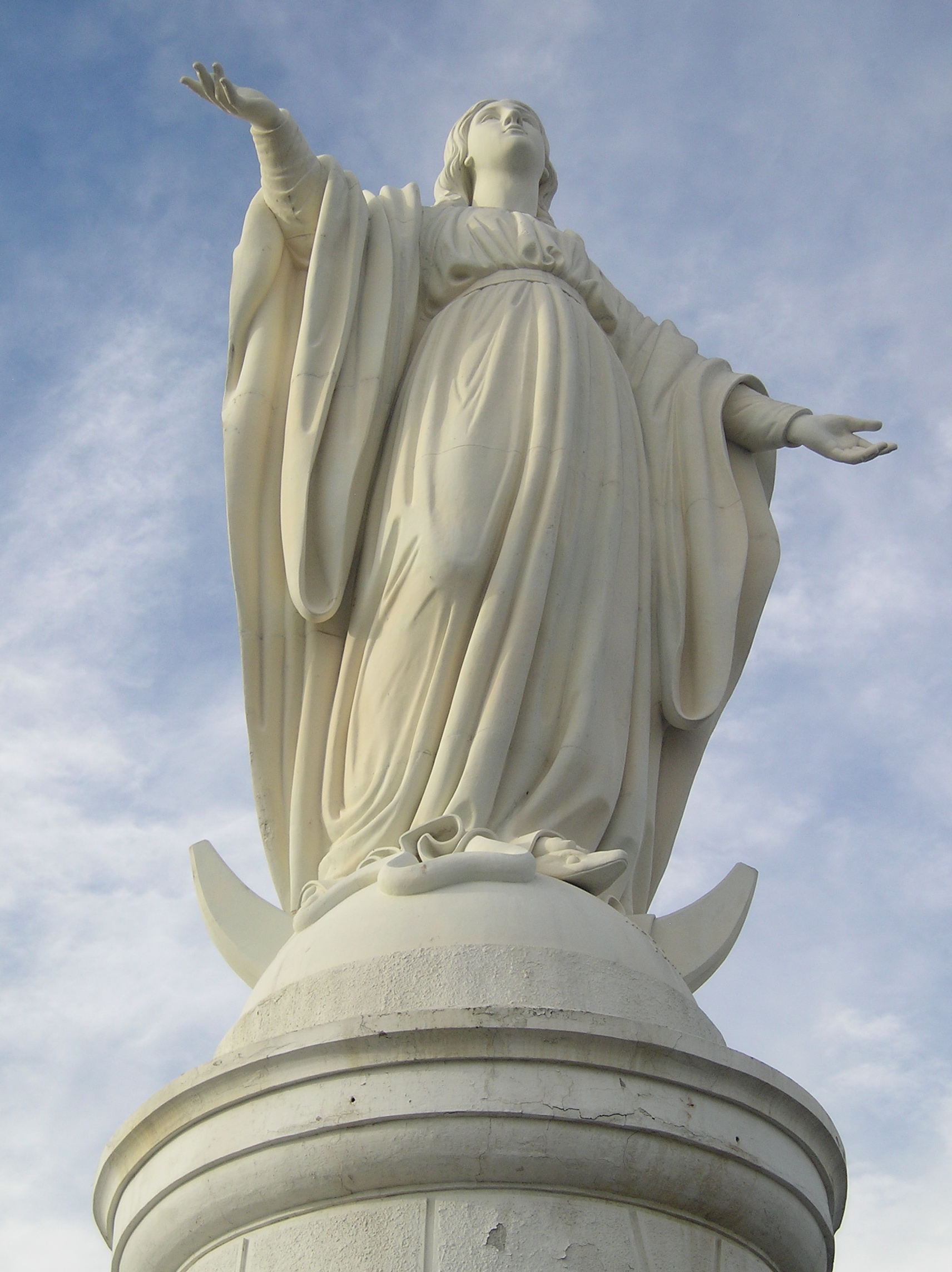 Estatua de la Inmaculada Concepción, ubicada en el Santuario del Cerro San Cristóbal a unos 863 metros sobre el nivel del mar en Santiago de Chile. Mide 14 metros de alto y pesa 36.610 kilos. Fue modelada en hierro por el escultor Jaconetti y su valor fue de 35.274 francos de la época. La Fundición Val D'Osne, de París, fue la que la contruyó. En el pedestal que la sostiene existe una capilla en la que S.S. Juan Pablo II oró y bendijo la ciudad de Santiago en 1987.